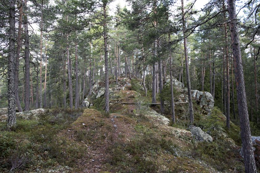 Slåtteberget (eller Slotteberget) bygdeborg, Ringerike kommune. Foto:Bjørn Johnsen. Fra Riksantikvarens Kulturminnesøk.